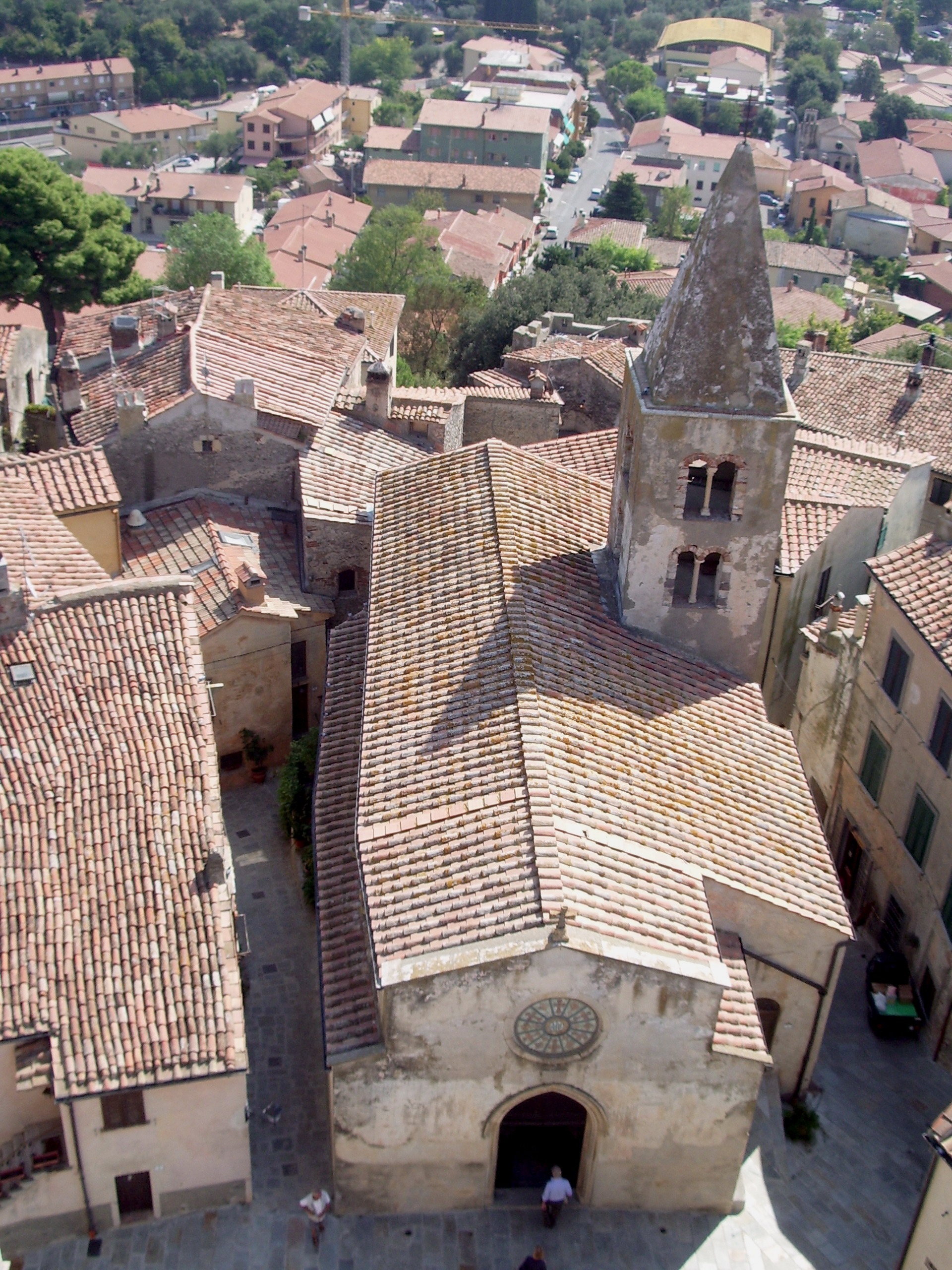 La chiesa di San Nicola a Capalbio vista dalla sommità della torre della Rocca Aldobrandesca